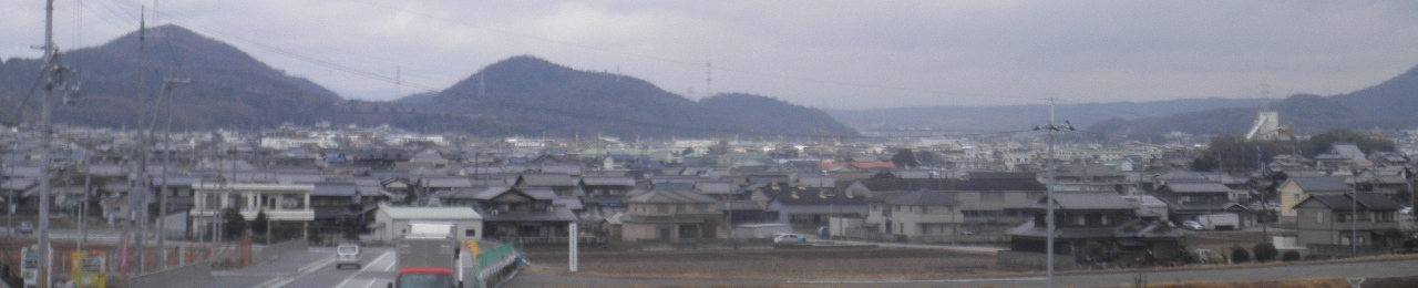 兵庫県加古川市 八幡町地区 遠景